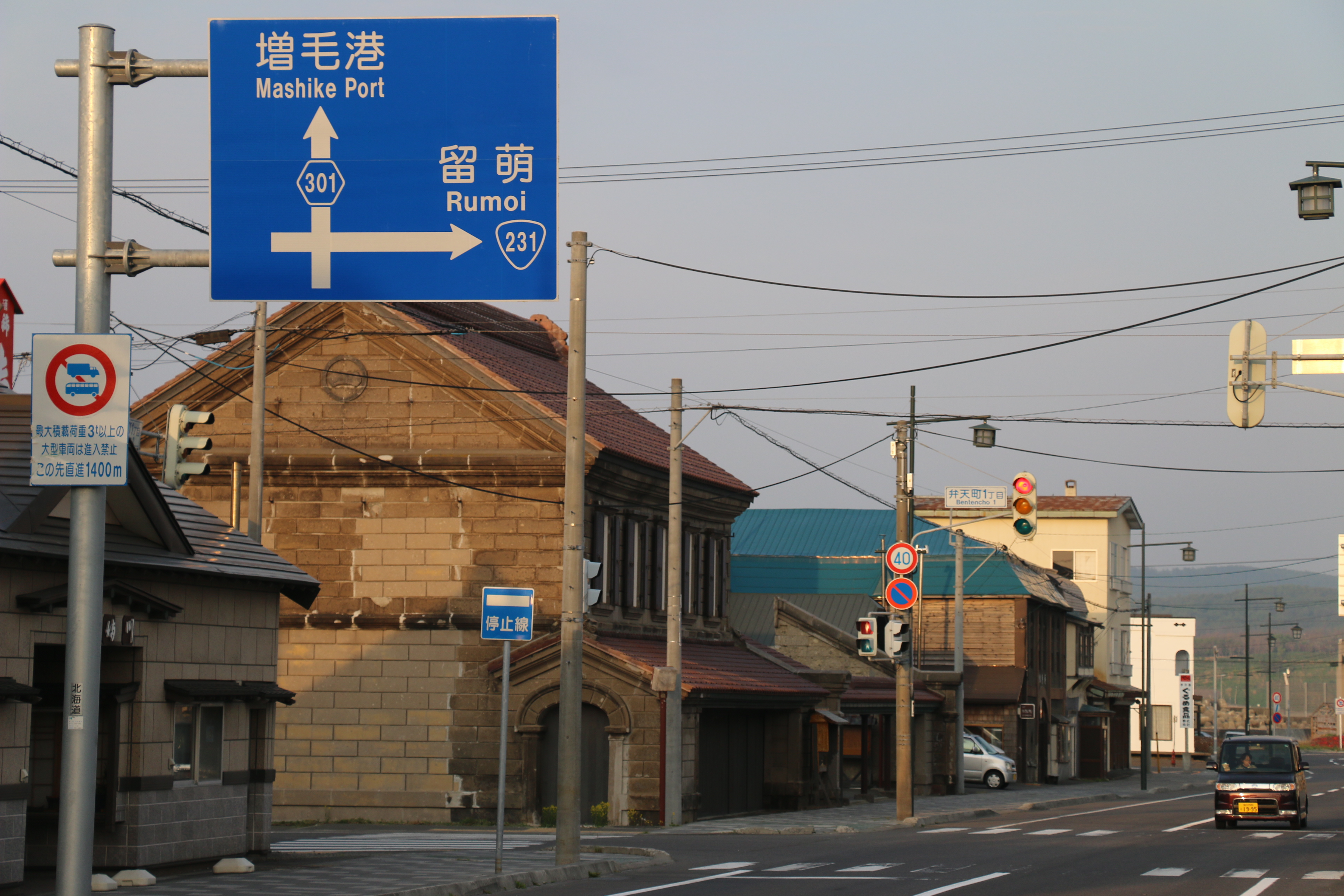 北海道道301号線 起点付近